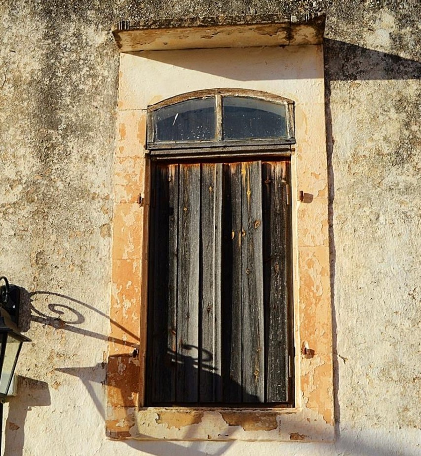 Καλανδαρέ: παράθυρο με φεγγίτη